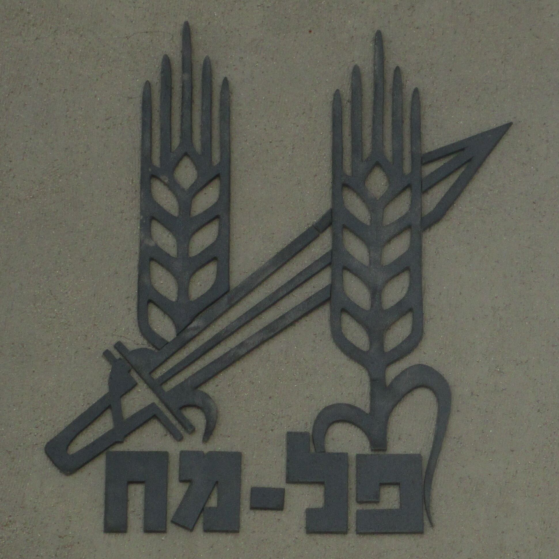 סמל הפלמ"ח באנדרטת הראל בגבעת הרדאר